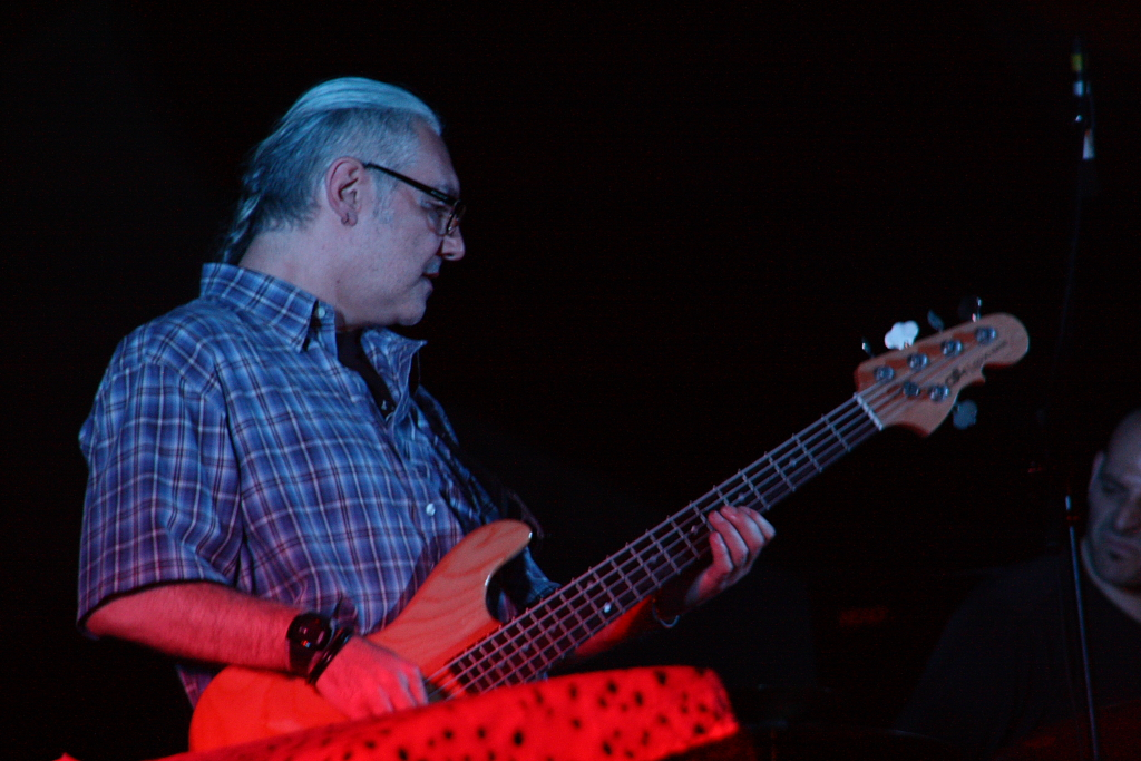 Foto tomada durante la presentación de Fractales, proyecto en solitario de Alejandro Otaola*, música ecléctica, densa y con potencia. Foro Universal del Polyforum Cultural Siqueiros, Ciudad de México.